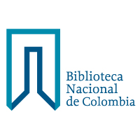 Logo de la Biblioteca Nacional de Colombia